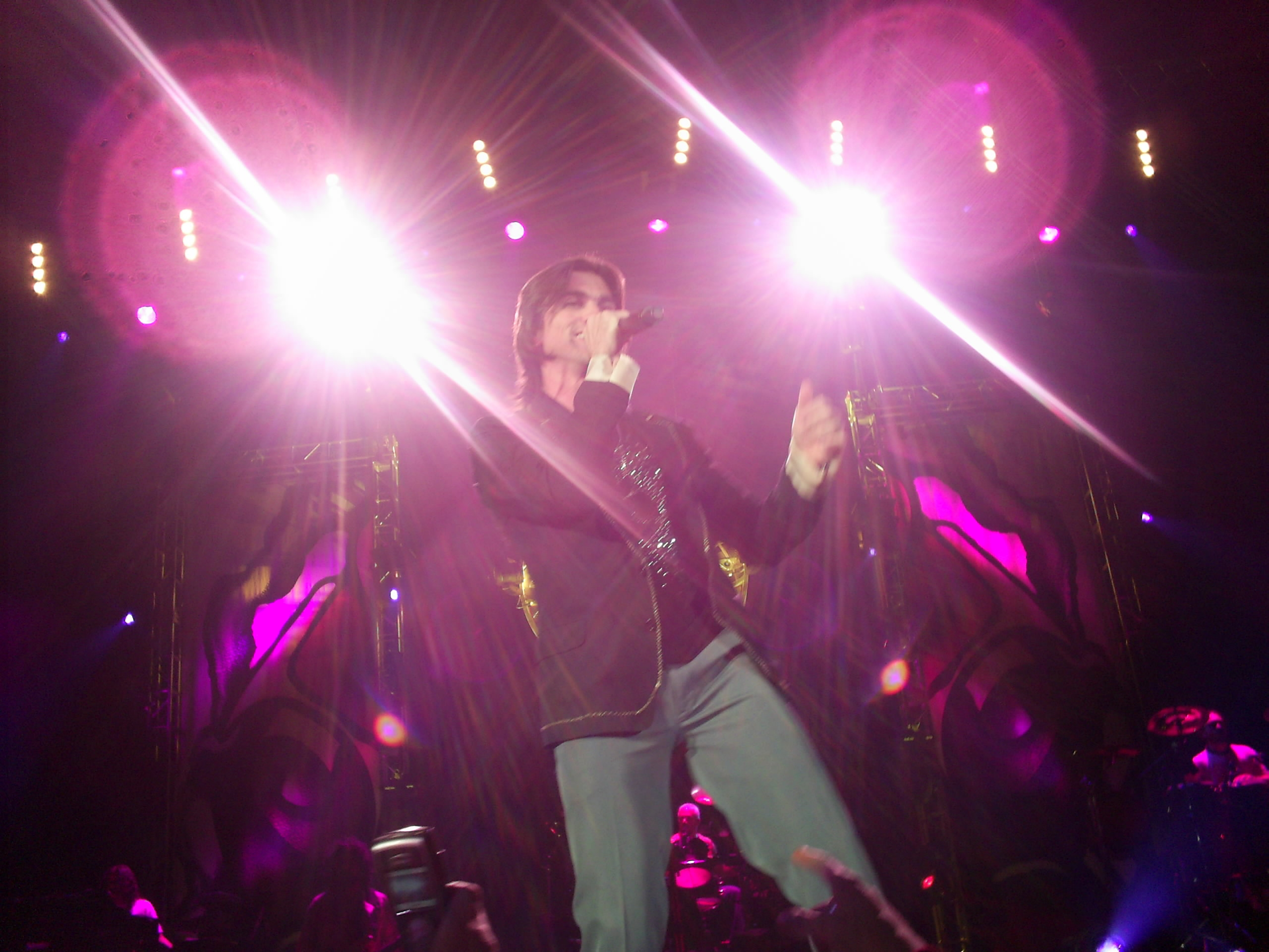 Juanes en concierto (Zúrich, Suiza)